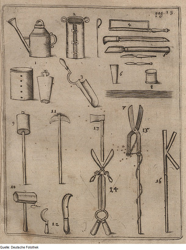 Original image description from the Deutsche FotothekPflanzenbau & Gartenbau & Gerät & Werkzeug